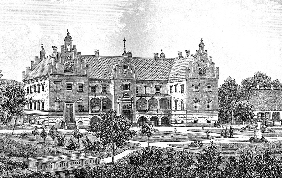 Holstenshus er en gammel hovedgård, som blev kaldt Finstrup og nævnes første gang i 1314.. Gården ligger i Diernæs Sogn, Sallinge Herred, Faaborg Kommune. Hovedbygningen er opført i 1910 efter en brand i 1908 .